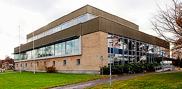 Broängsbadet var ett badhus i Kristinehamn som revs 2012